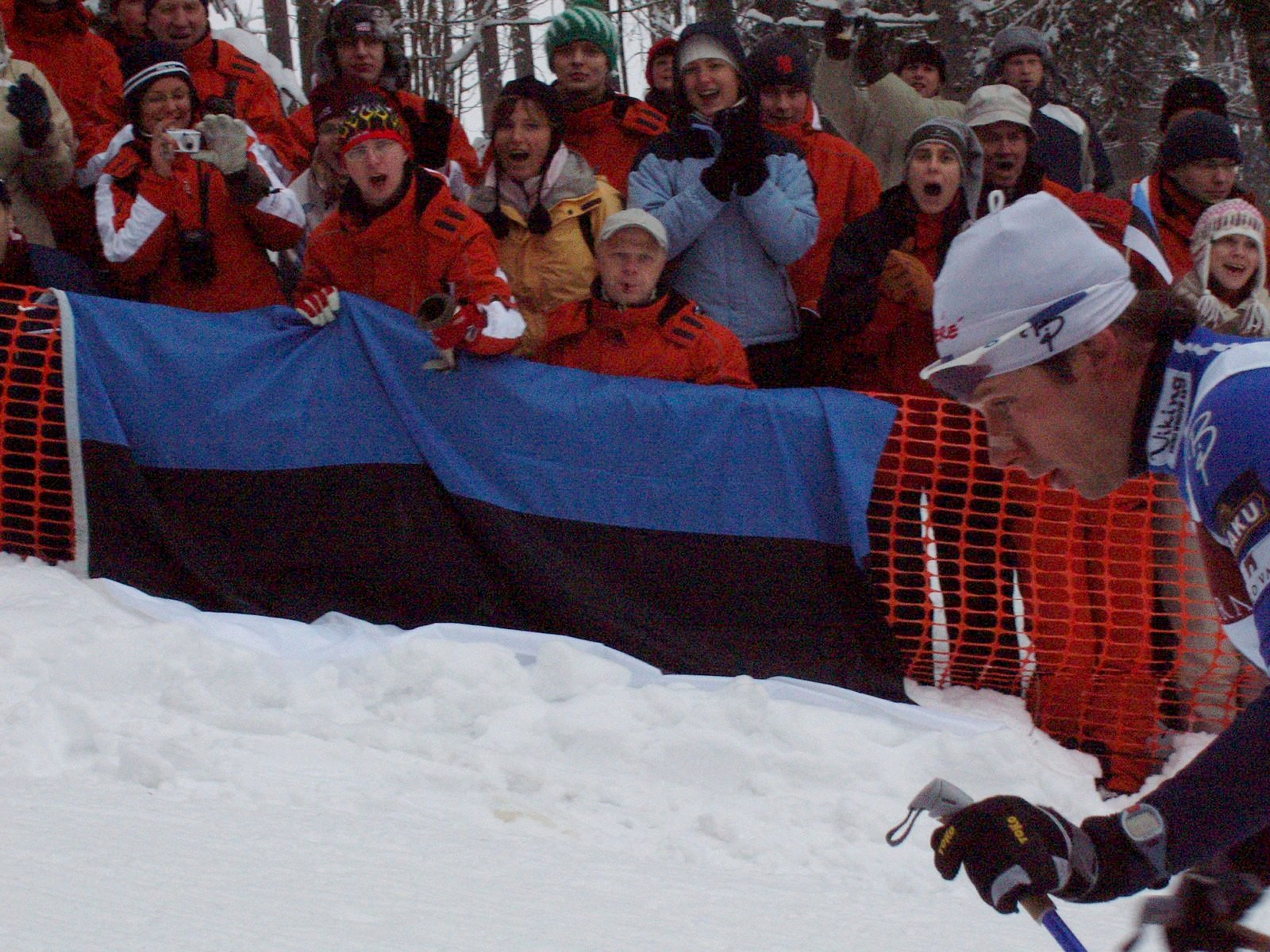 Jaak Mae Otepää MK etapil 2006. aastal